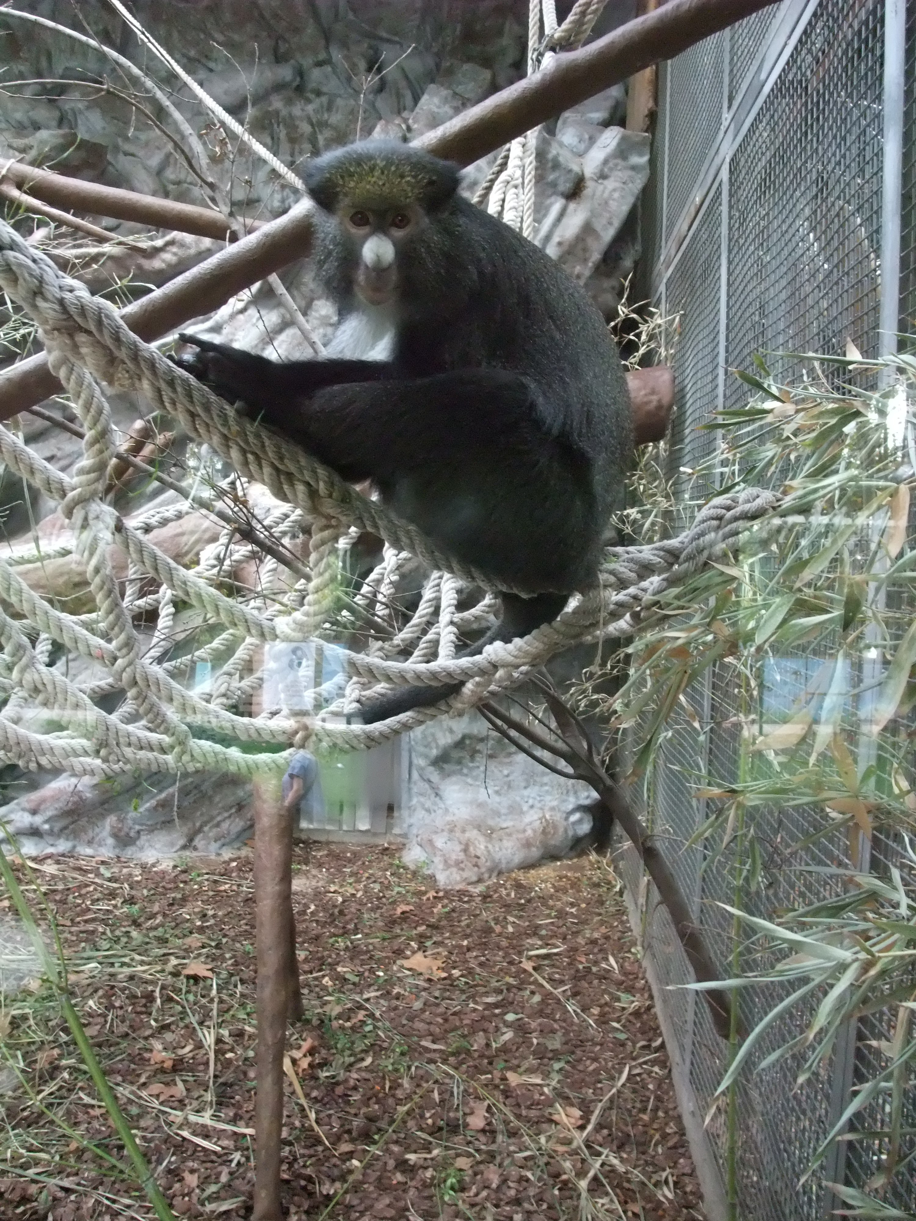 Barcelona-Zoo-Mono de nariz blanca (Cercopithecus nictitans martini)